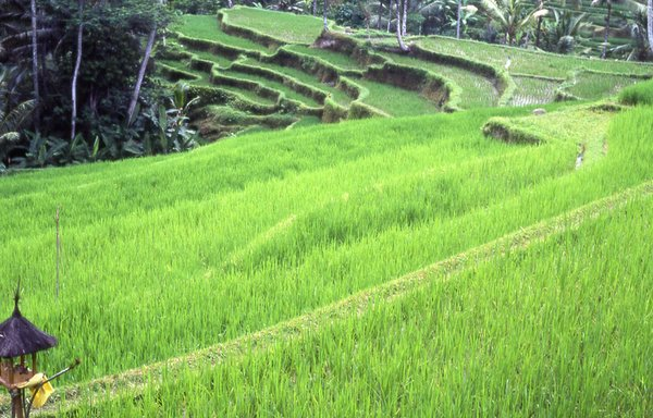 Une rizière à Bali